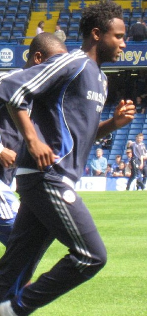 Mikel John Obi